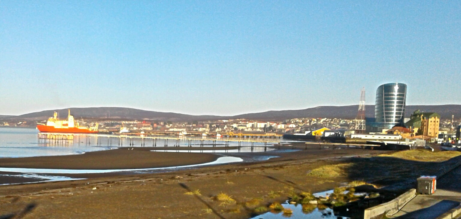 Vista dela costanera ala ciudad de Punta Arenas. El 10 de mayo de 2016.